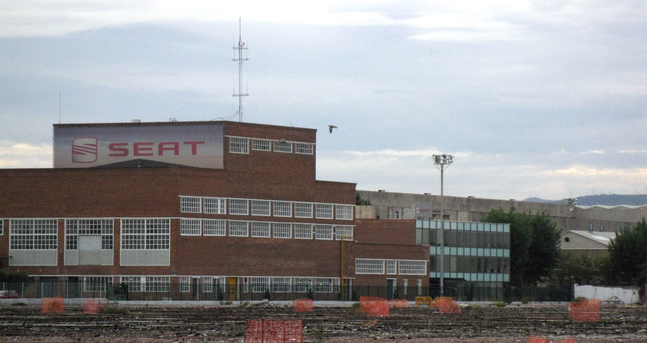 Laboratoris Fàbrica Seat (Barcelona)